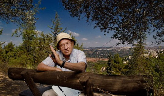 אהרון רזין - פרוספור לחקר הסרטן